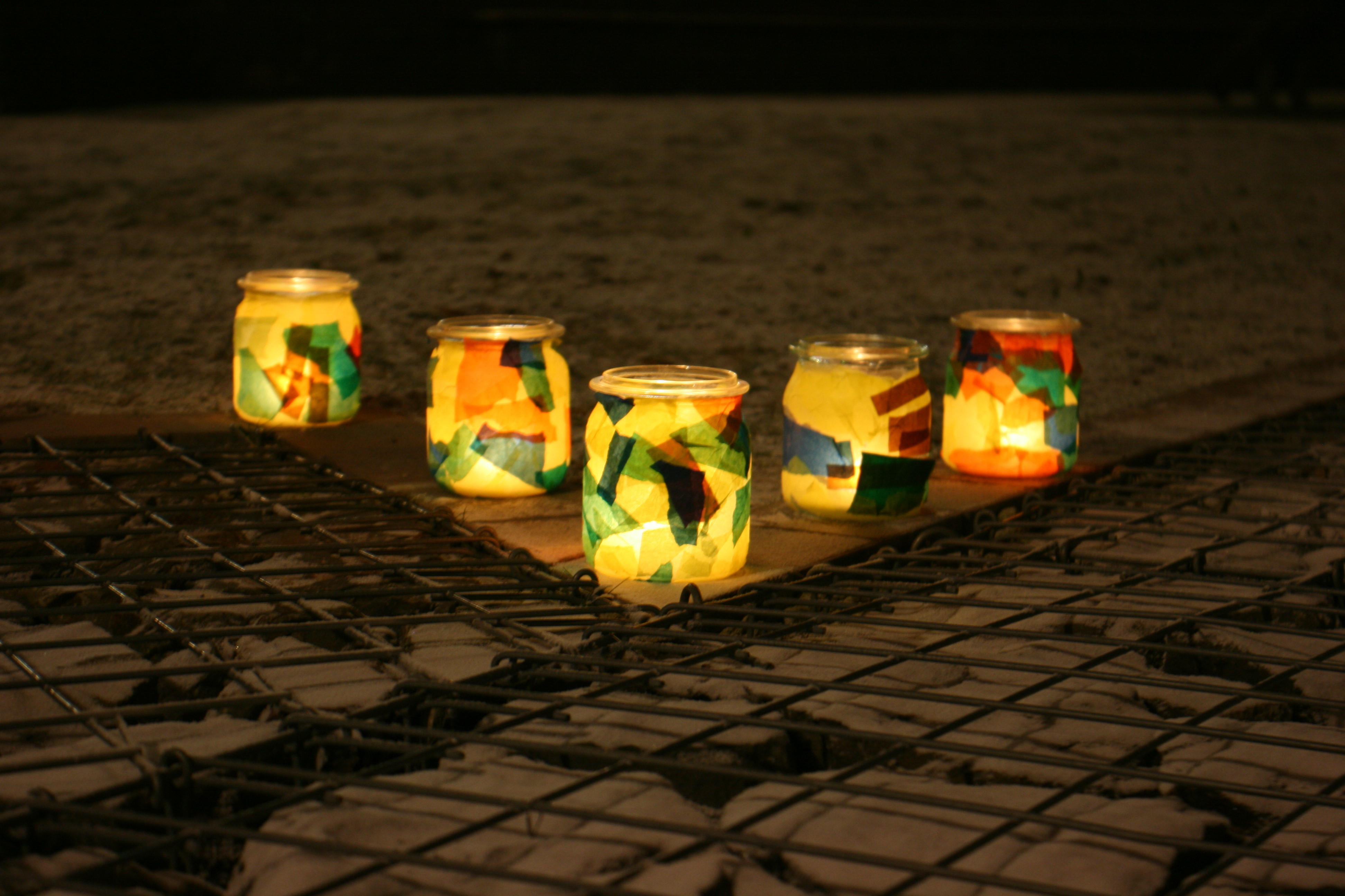 „1. Lichterfest am Rosenhügel“, Konsumterrassen, Im Loborn in Remscheid am 01.02.2011